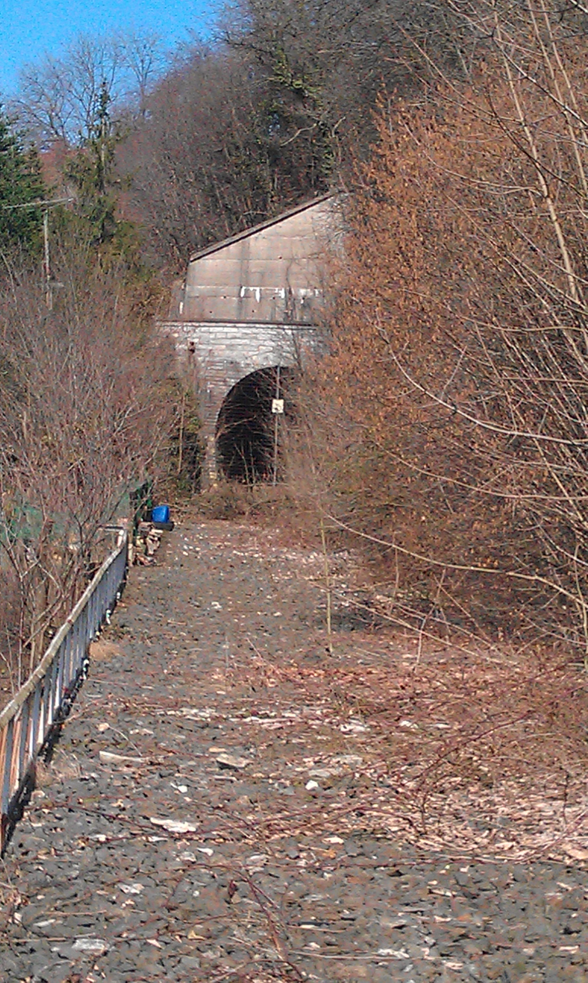 Umgebung am Südportal des Ahdener Tunnel mit einer Länge von 118 Meter.